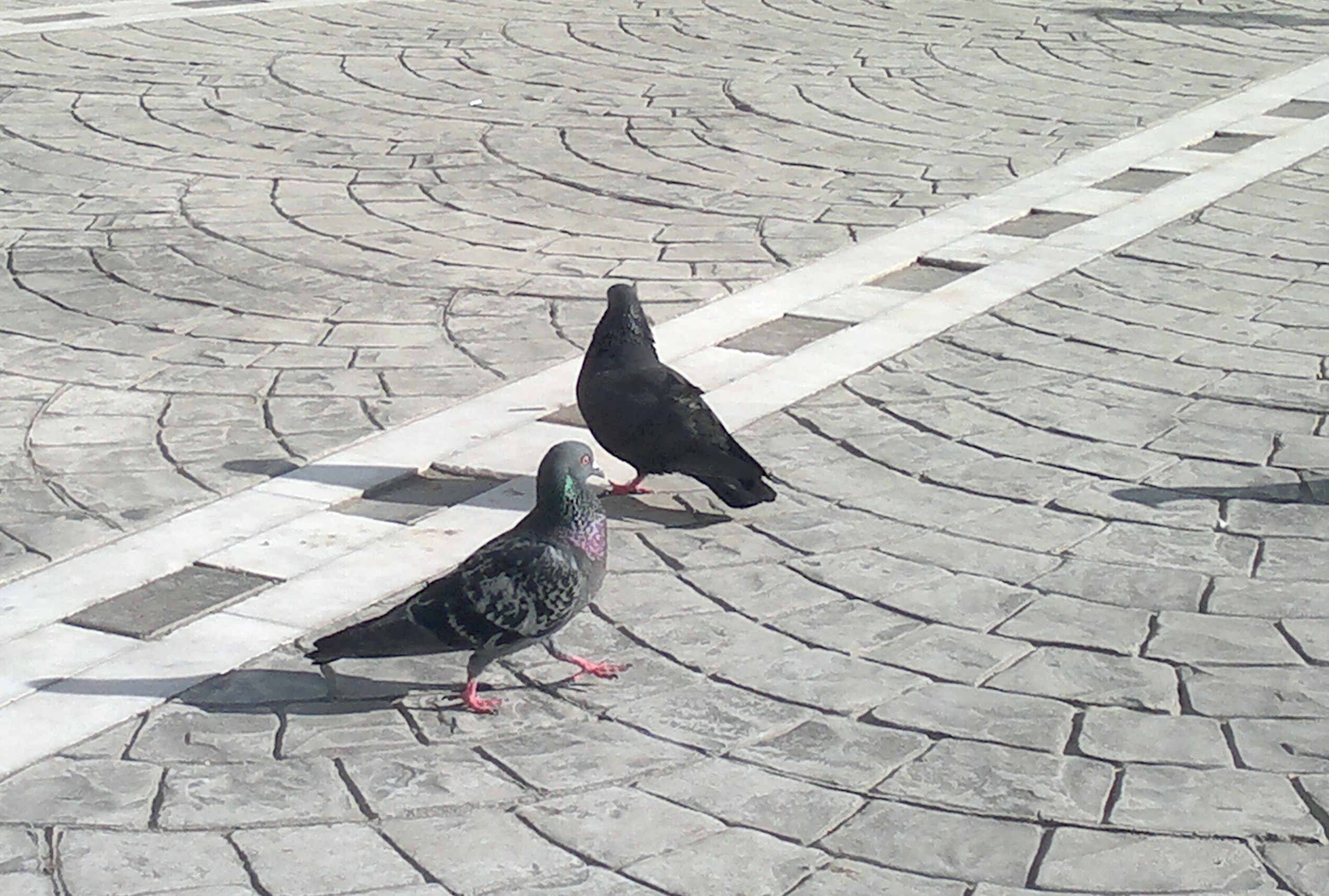 Çiftleşme döneminde güvercinler.